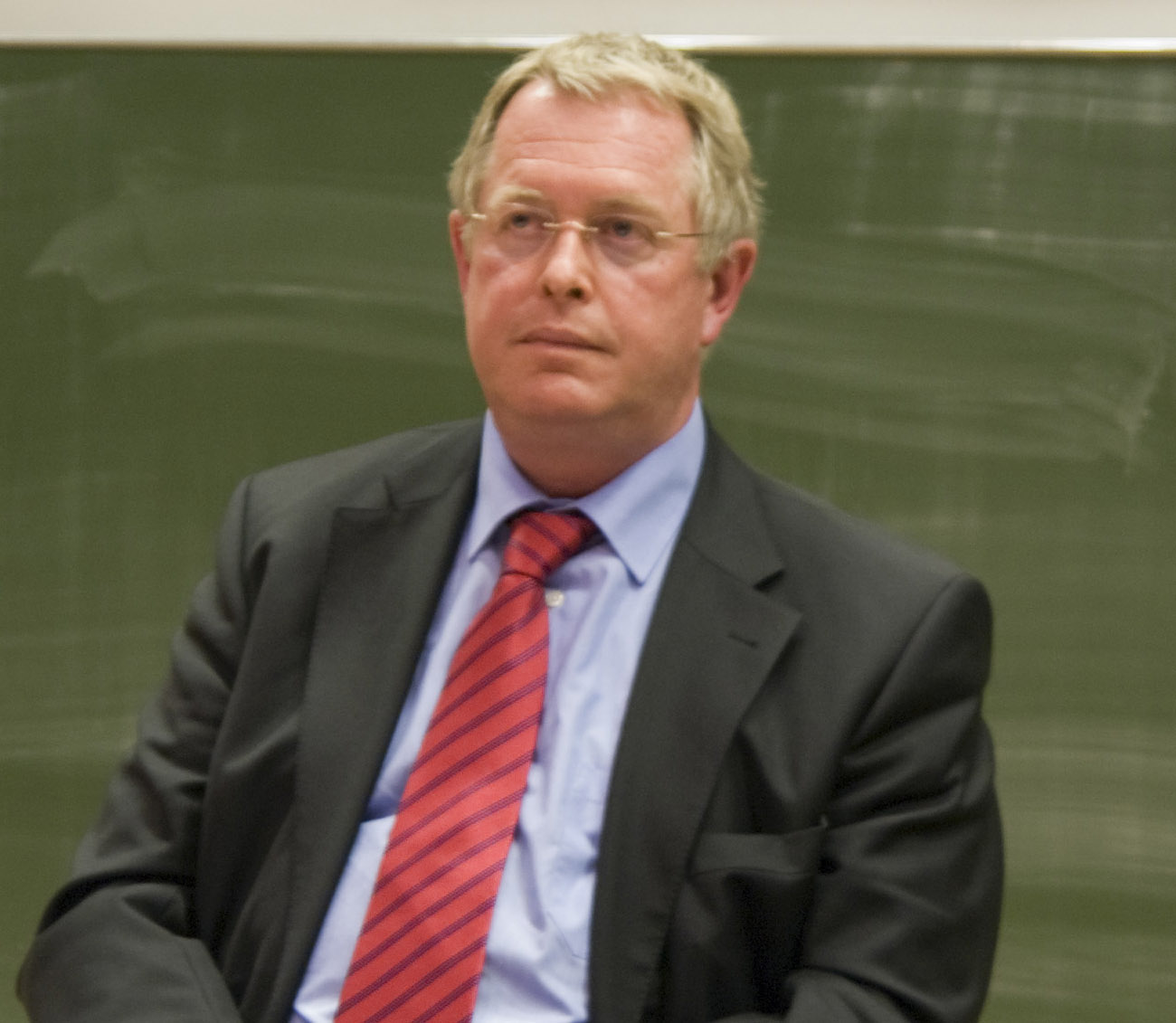 Kärntens Alt-Landeshauptmann Christof Zernatto bei einer Diskussionveranstaltung an der Alpen-Adria-Universität Klagenfurt